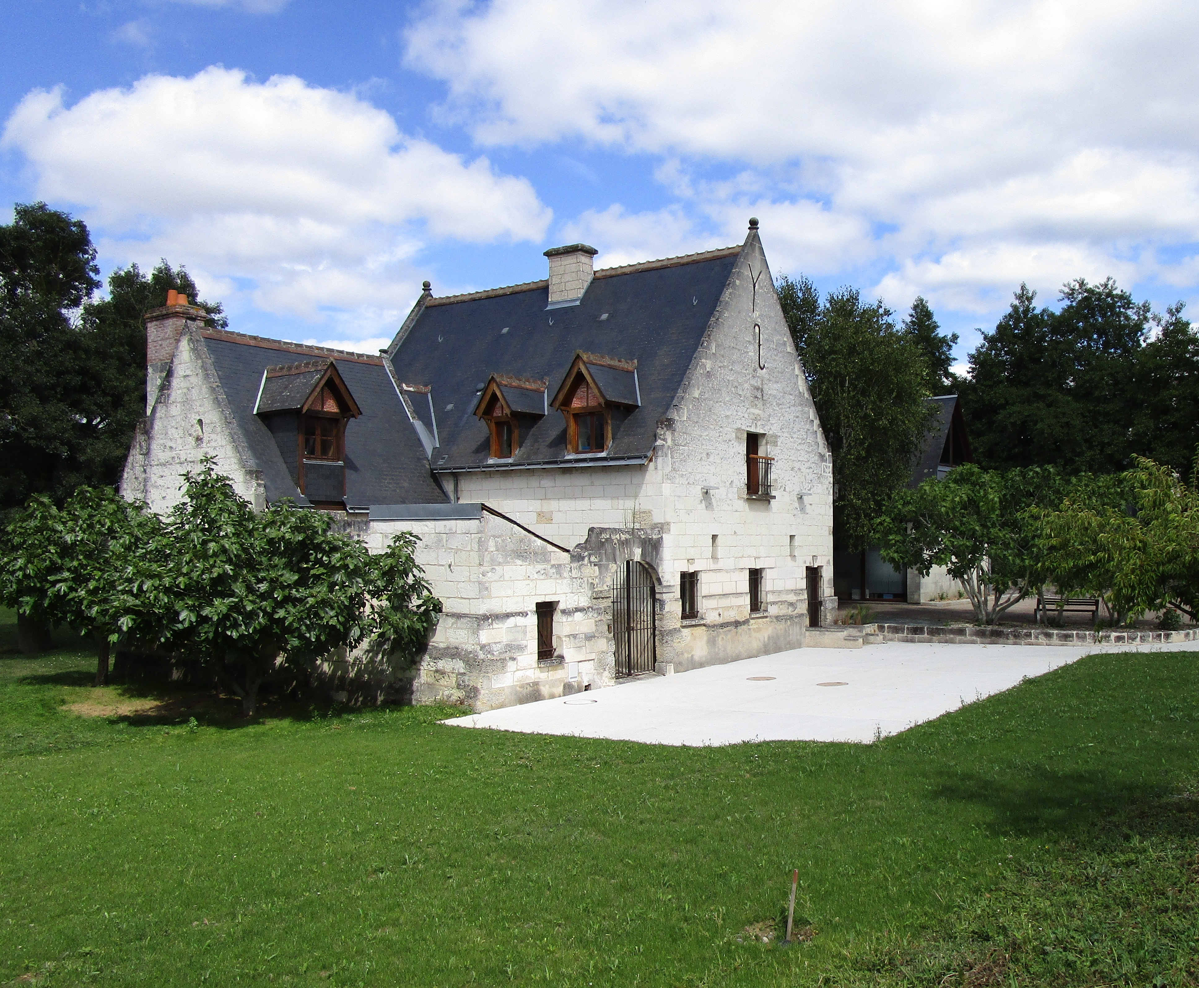 Ancienne ferme agricole des Deux-Lions à Tours, reconvertie